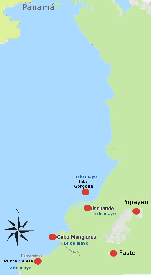 combate naval de Manglares